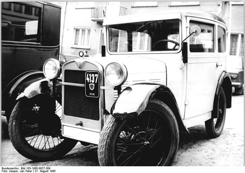 Münchenbernsdorf, Oldtimer, BMW DA 2 ADN-ZB Kasper 27.8.85 Bez. Gera: Dieser BMW DA 2 mit 750 cm³ aus dem Jahre 1929 war beim Veteranentreffen der Fahrzeuge im Juni 1985 in Münchenbernsdorf zu sehen. (siehe auch 310 und 311 N)